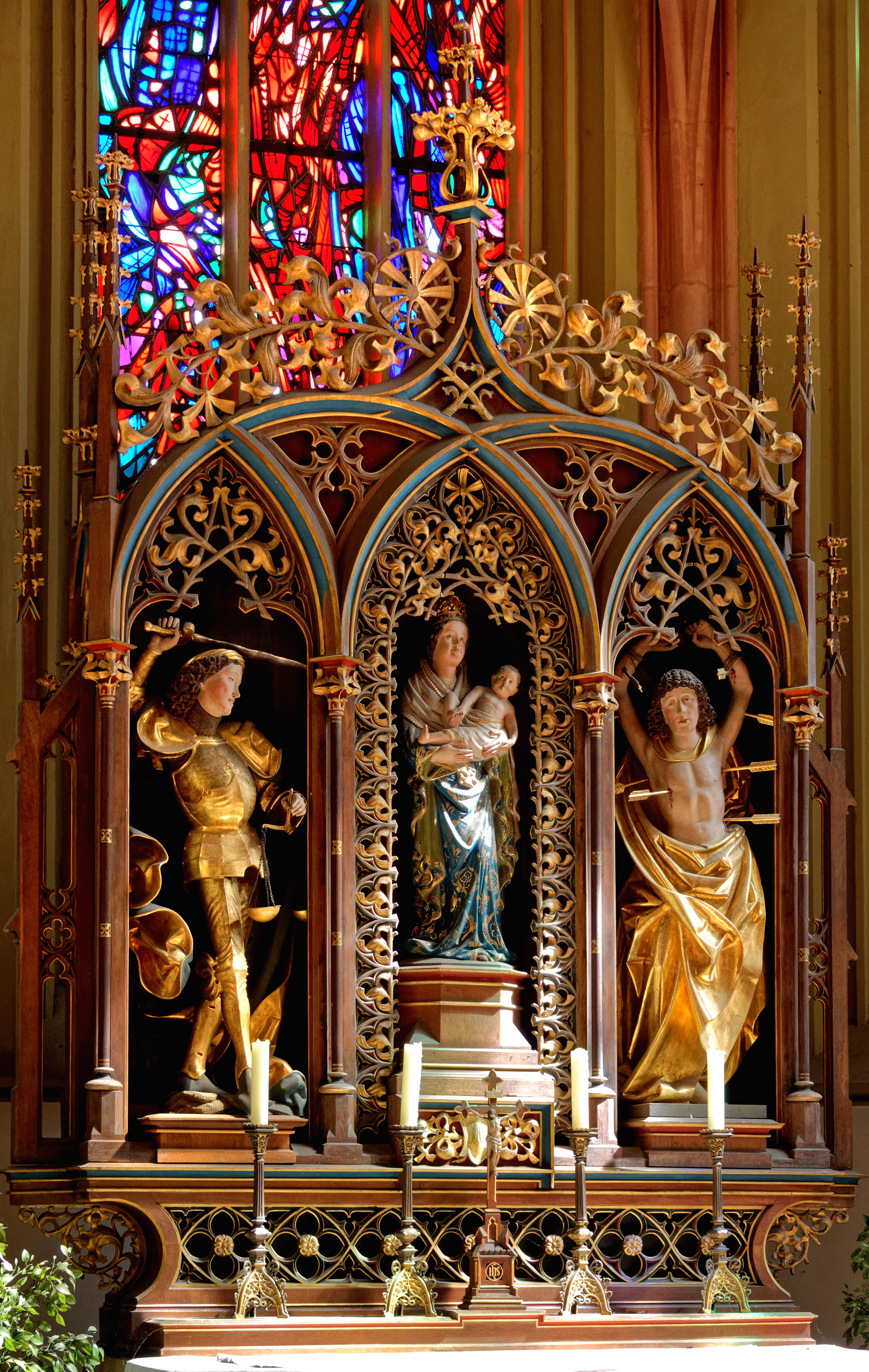 Interior of the chapel St. Michael in Ochsenfurt.